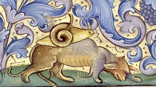 Heures de Charles VIII 106R Saint Christophe (bas)